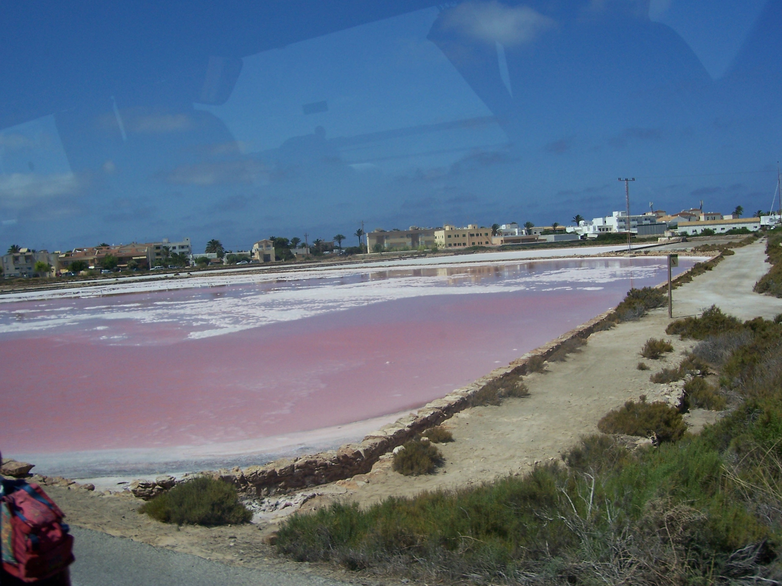 Salina a Formentera, a ridosso del porto di La Savina